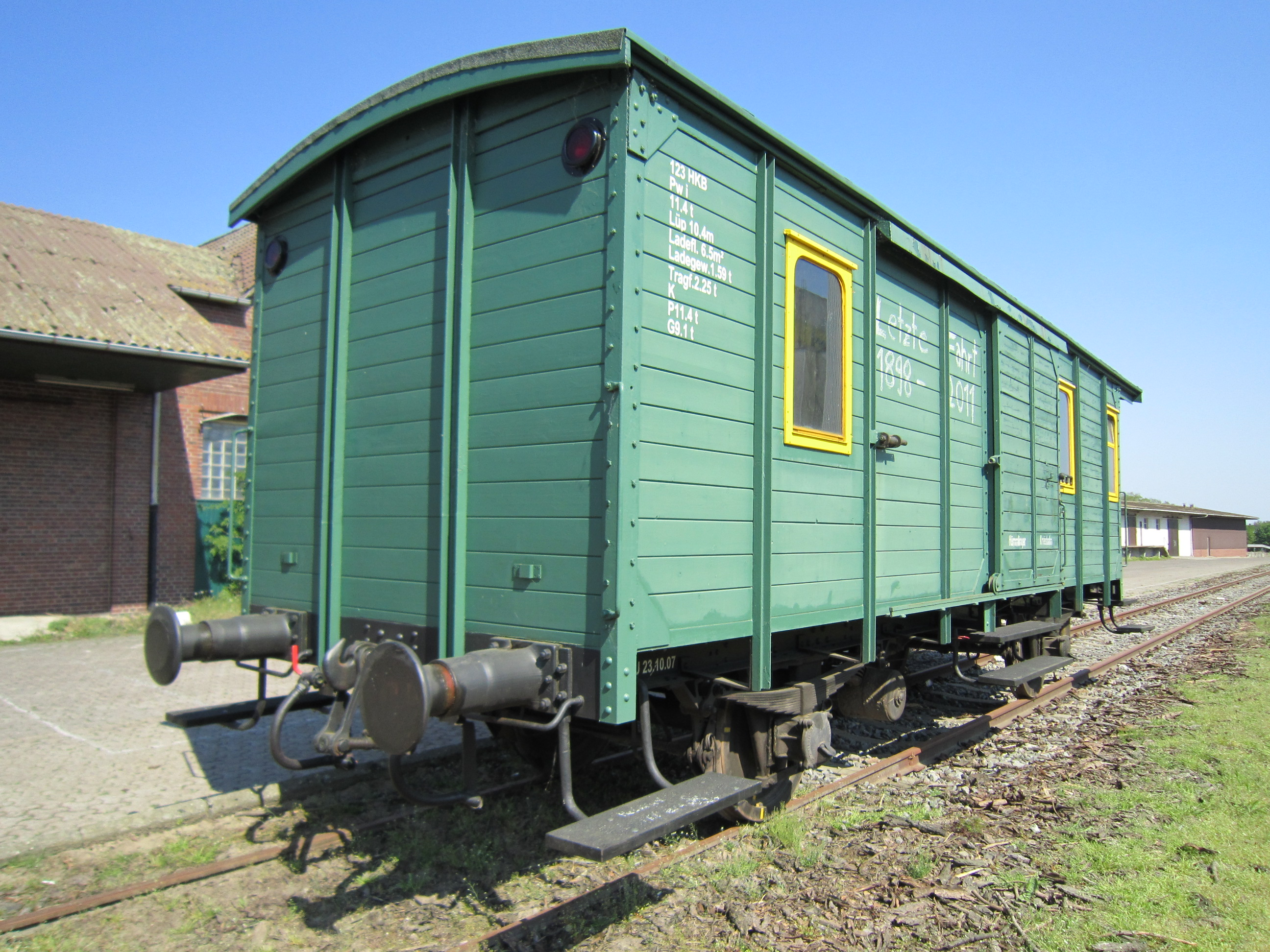 Bahnhof Sögel, Waggon der Hümmlinger Kreisbahn